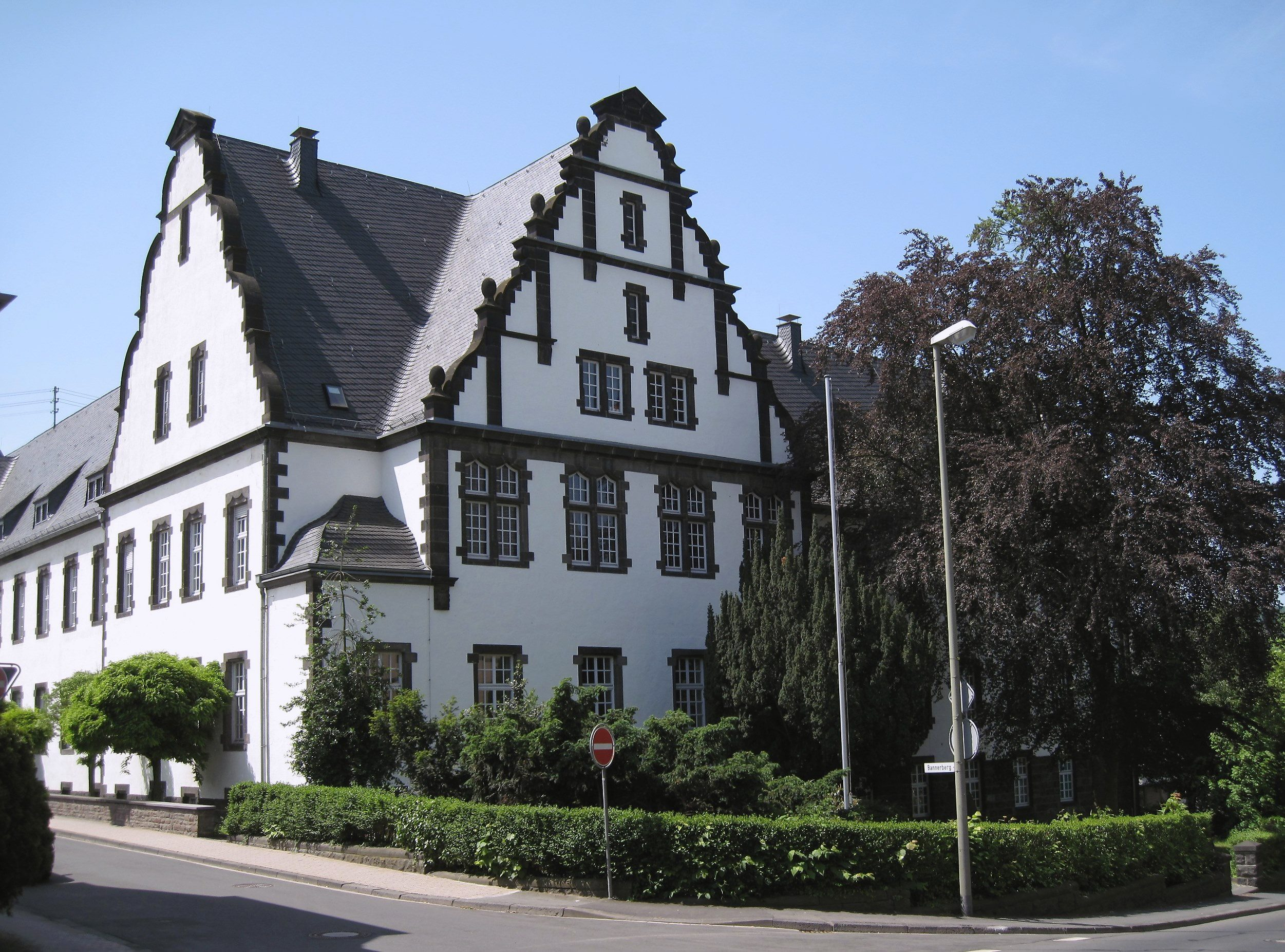 Gebäude (Altbau) des Amtsgerichts Mayen in Mayen.